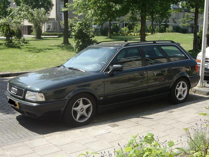 Audi 80 Avant 2.0 B4, uit 1994.